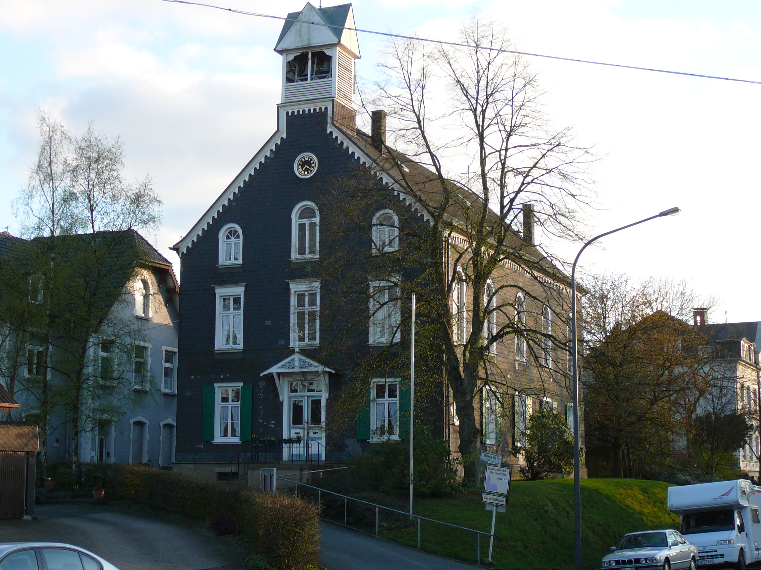 Wittener Straße, Wuppertal